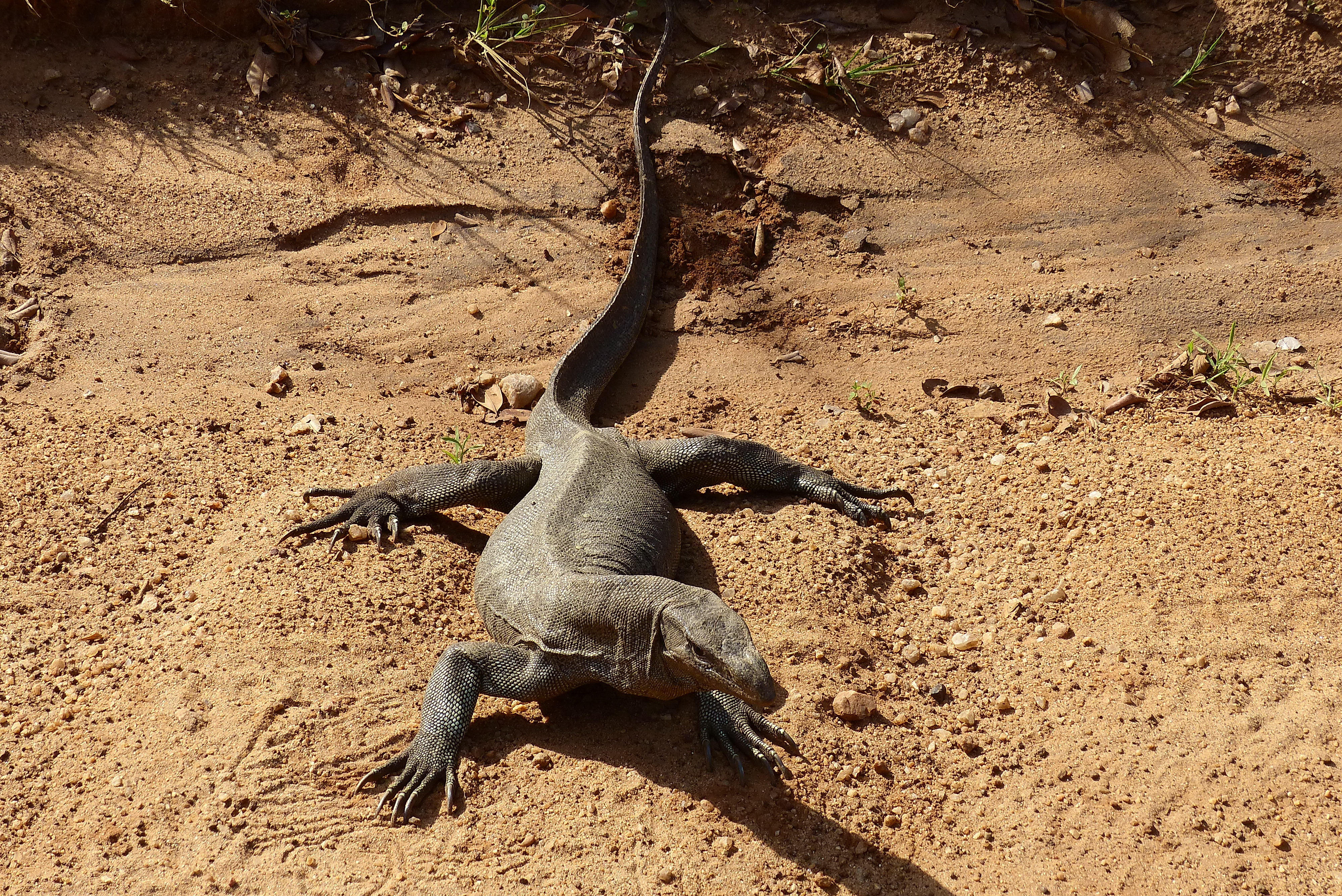 Bengalenwaran (Varanus bengalensis) im Yala Nationalpark, Sri Lanka